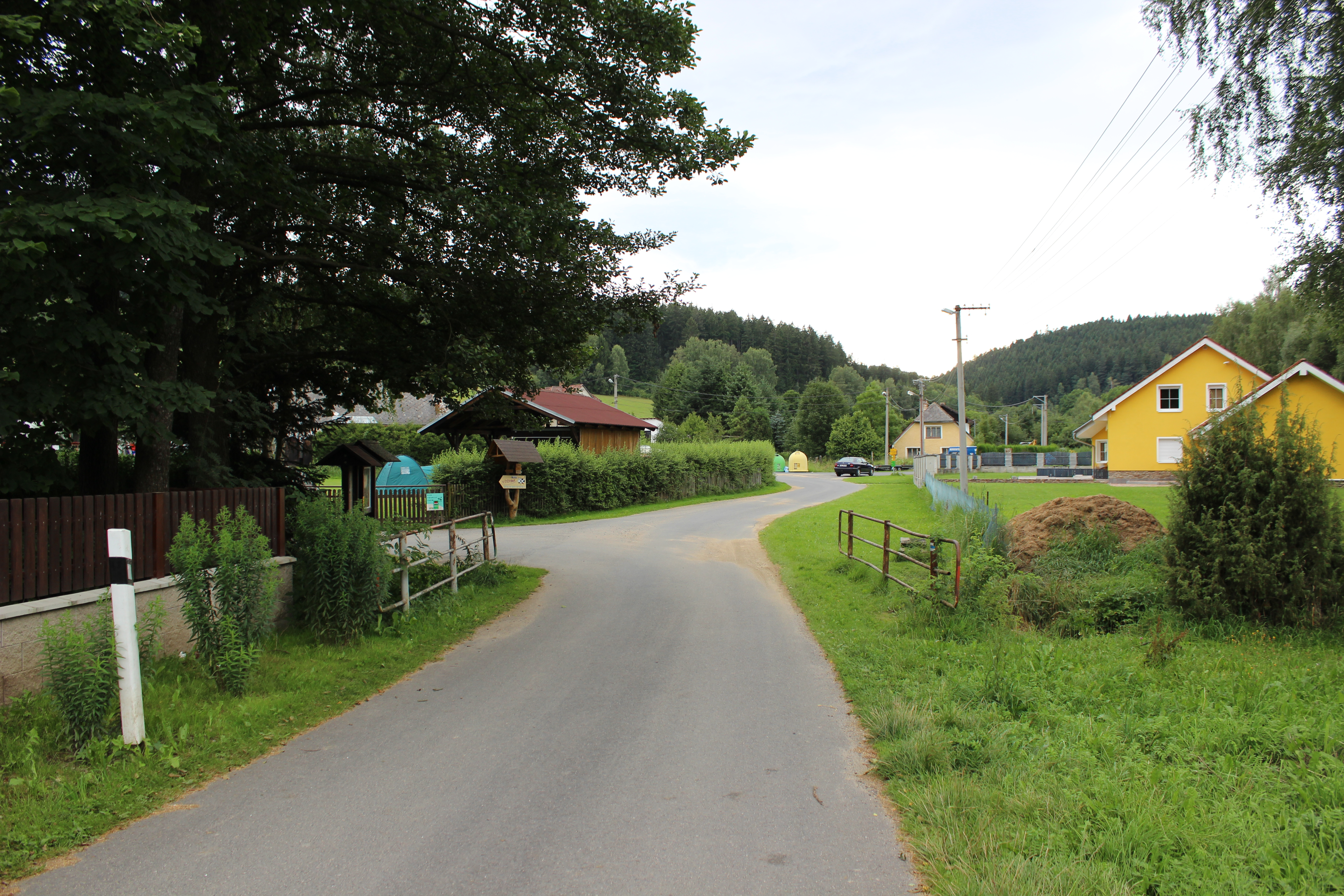 Náves ve Vojeticích.